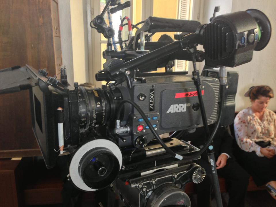 Arri Alexa Plus - cinematographic camera.